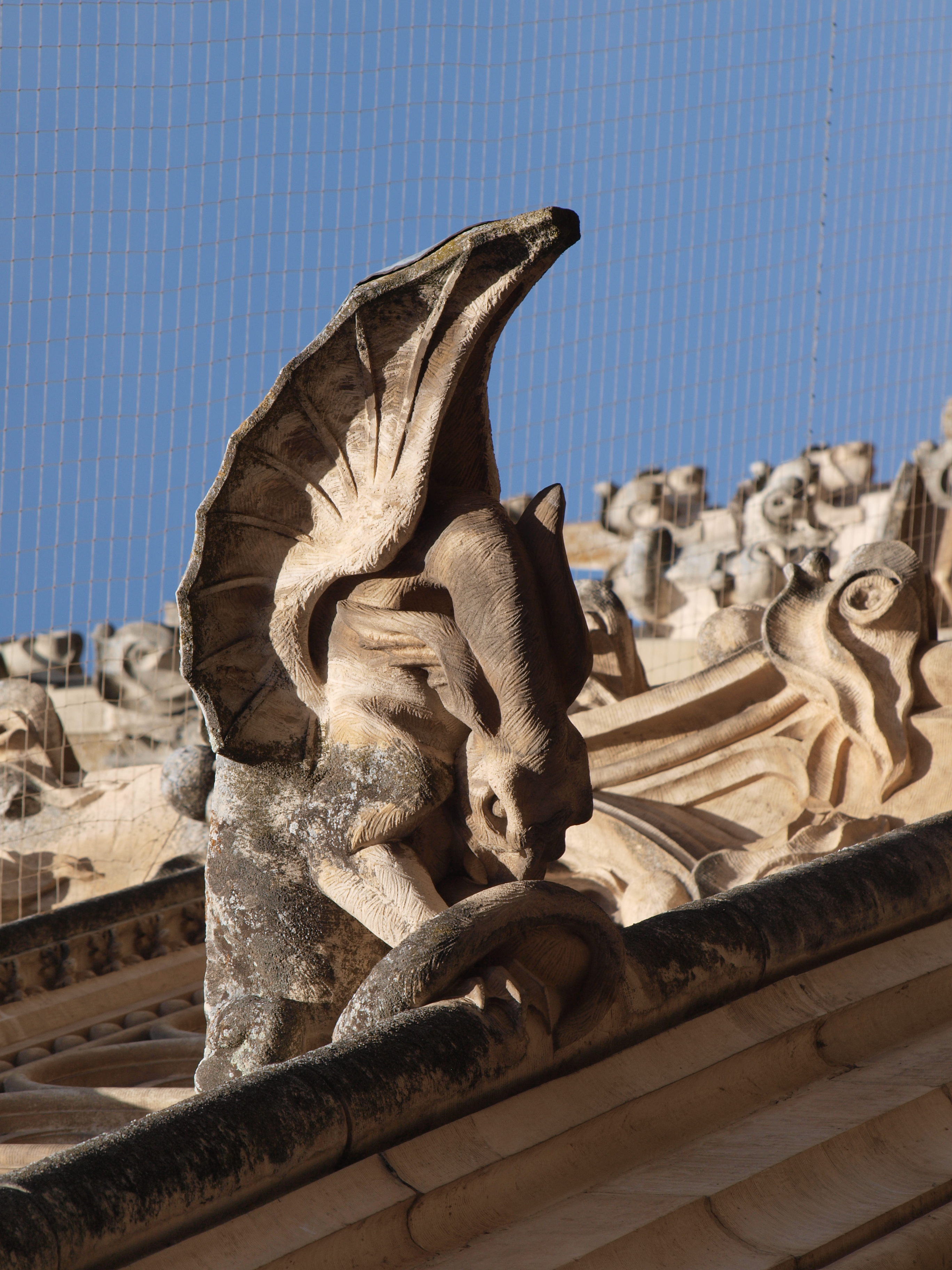 Gárgola del claustro del Monasterio de San Juan de los Reyes